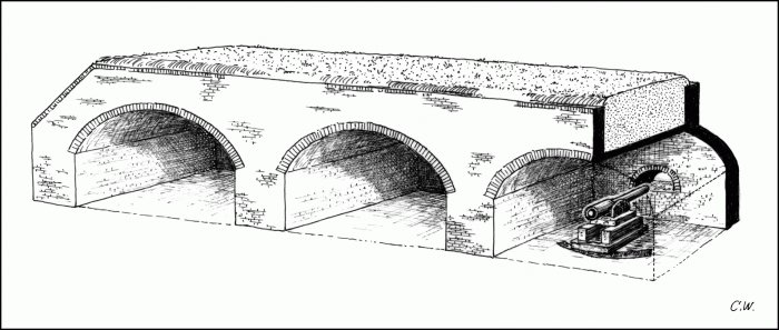 Coupe d'une casemate à trois positions d'artillerie